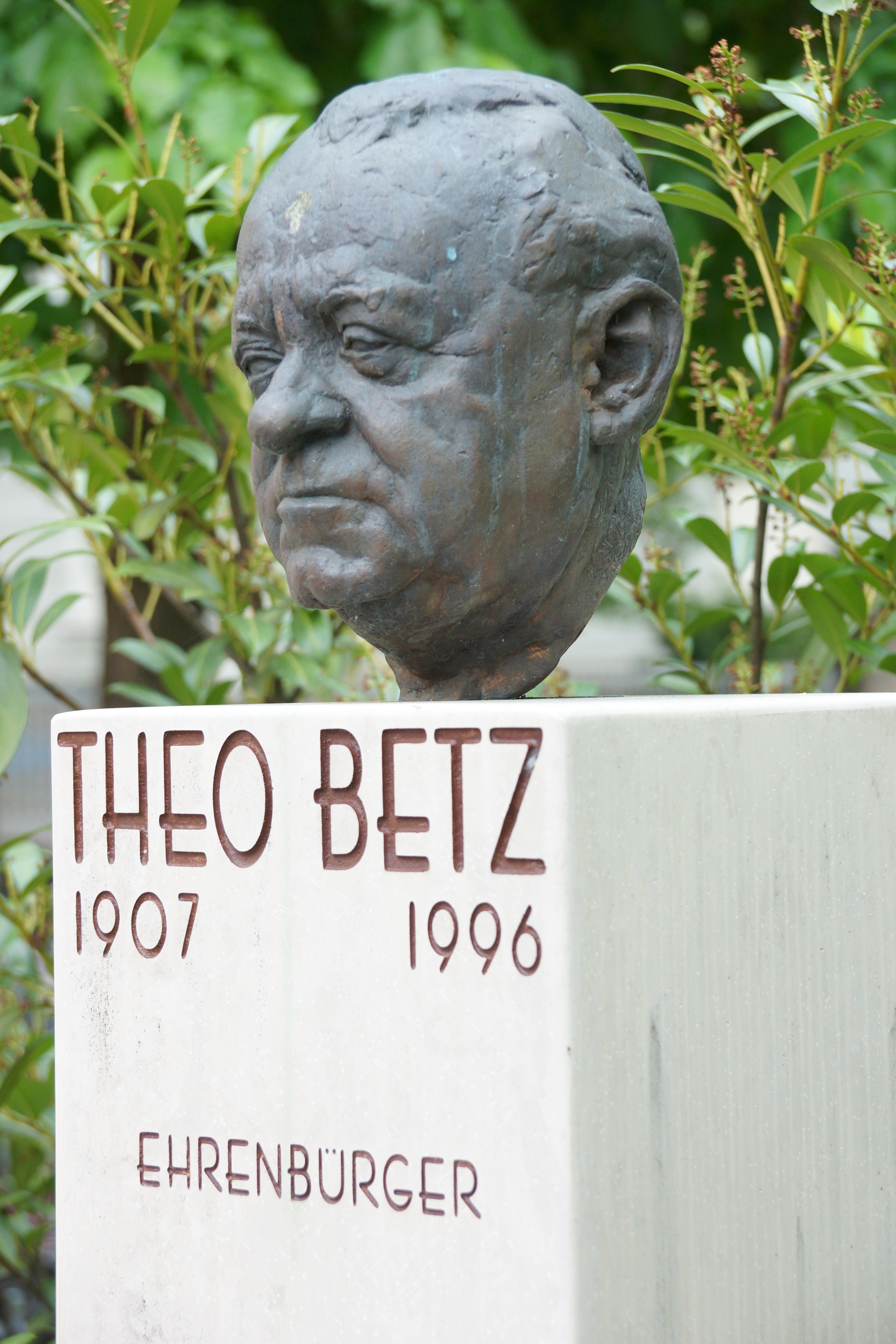 Büste des ehemaligen Oberbürgermeisters Theo Betz (1907-1996) von Neumarkt in der Oberpfalz am Theo-Betz-Platz / Oberen Tor